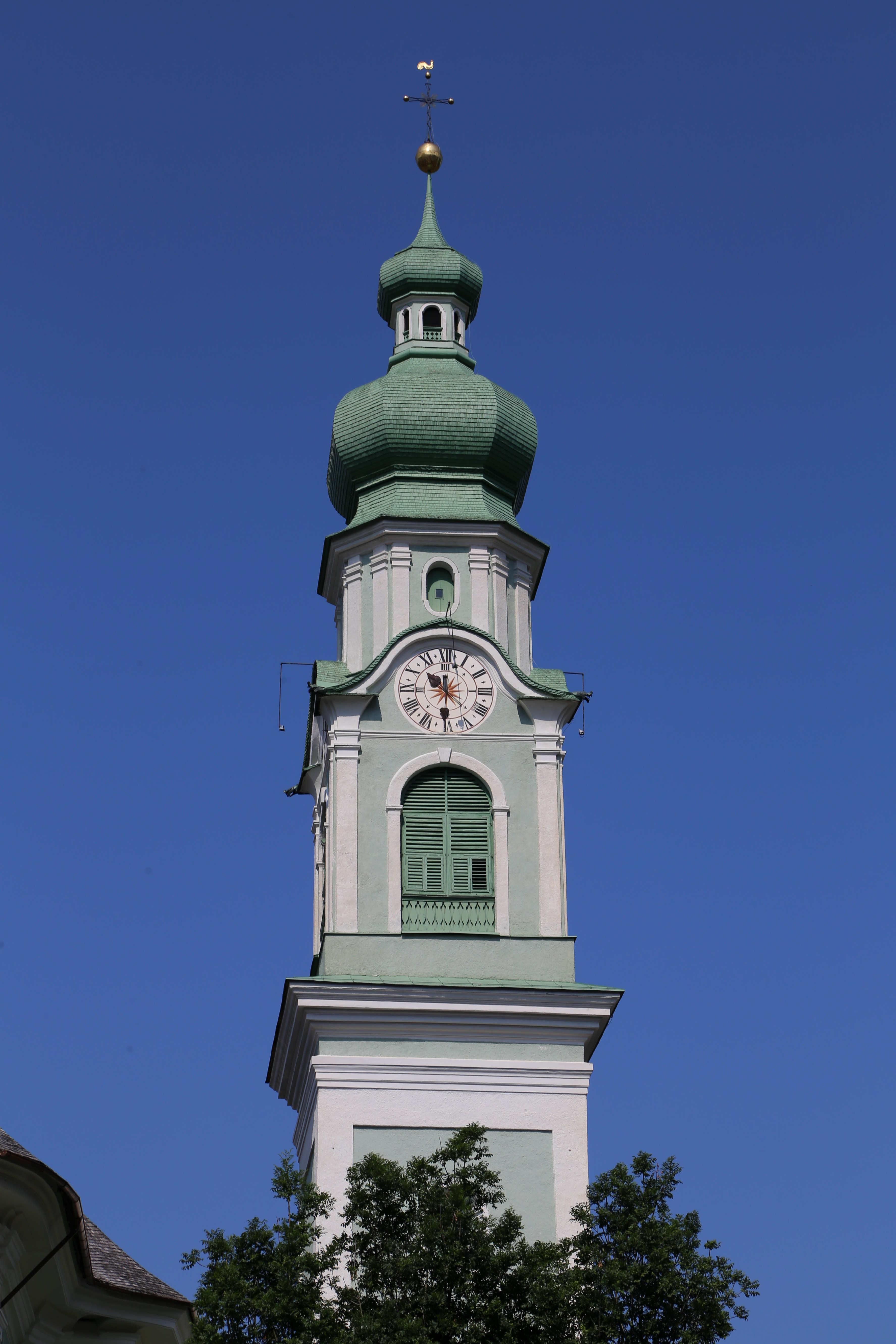 Pfarrkirche St. Johannes der Täufer, Toblach Barockes Langhaus von Baumeister Rudolf Schraffl, 1769 errichtet. Freistehender Turm mit Oktogon und Zwiebelhaube um 1800. Wandpfeilerbau mit leicht abgeecktem quadratischem Chor. Flachkuppeln, Fresken-ausstattung von Franz Anton Zeiller (1769).